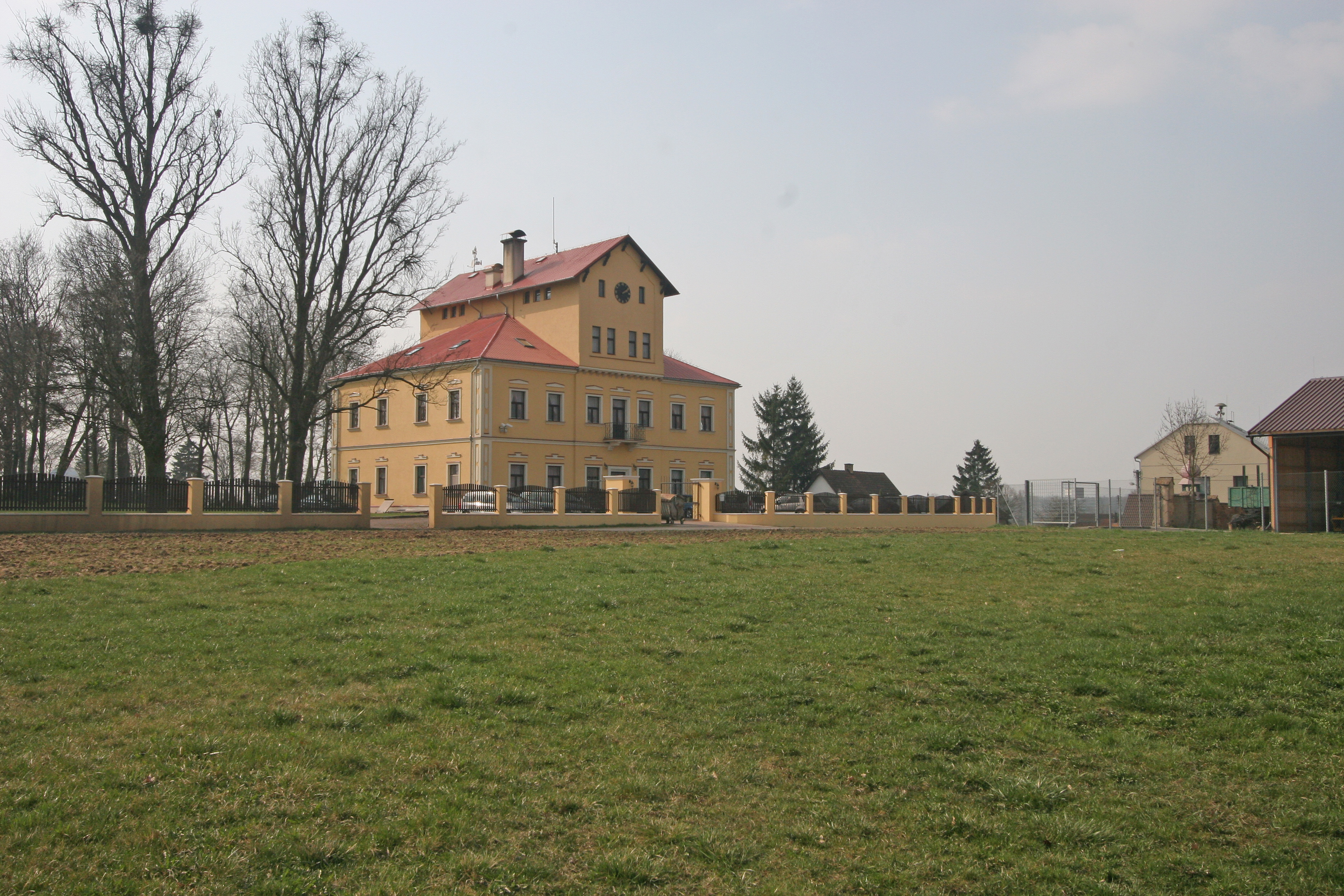 Zámek v Tuři